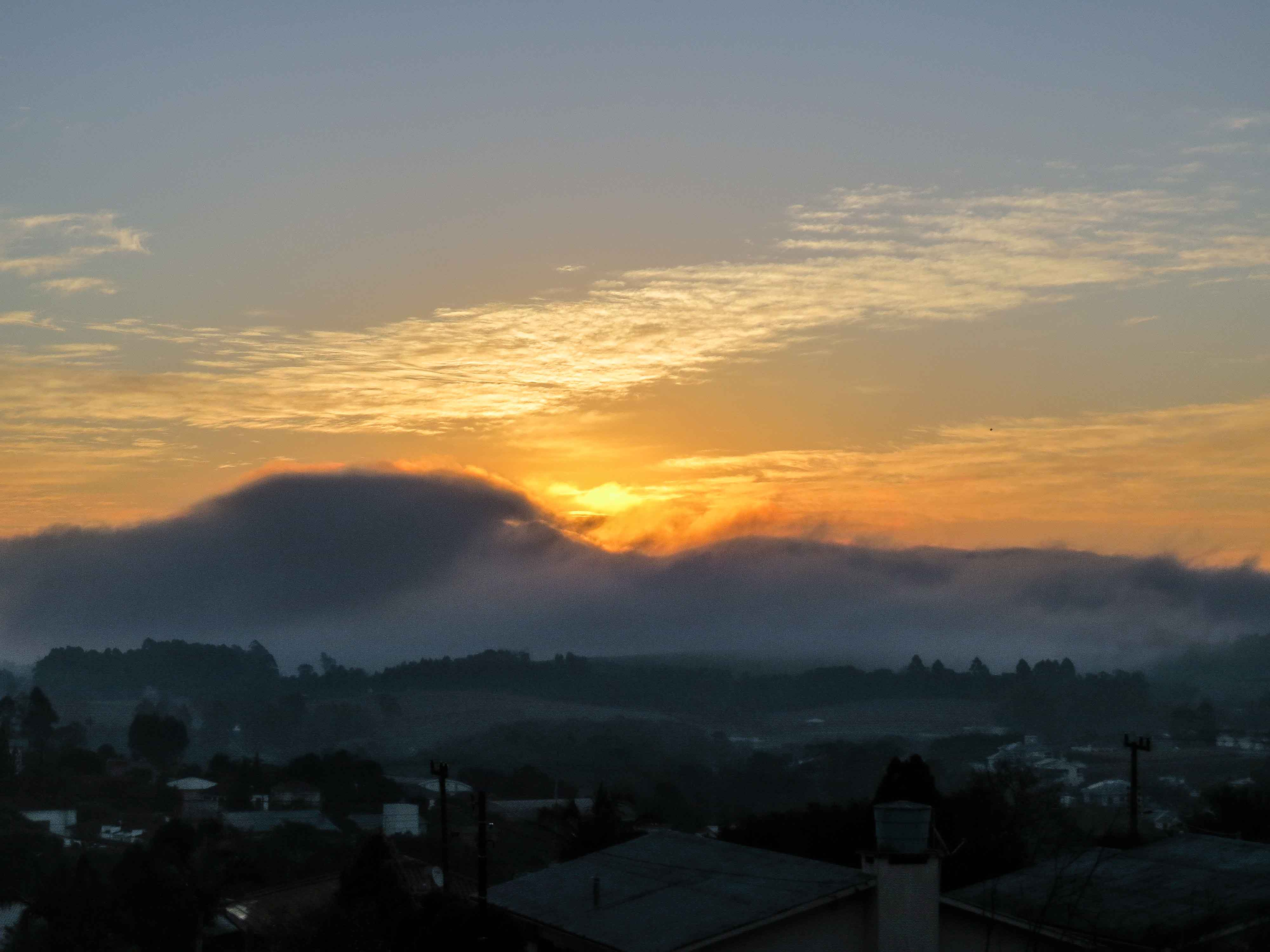 Nevoeiro em Iporã do Oeste, visto do ponto mais alto da cidade, ~607 metros acima do nível do mar